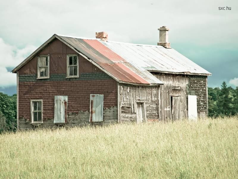 Casa Bautare - Joensuu Finlandia